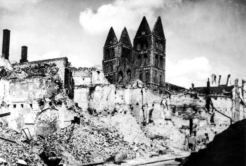 Lübeck. Ruinen um die Marienkirche von der Braunstrasse gesehen.